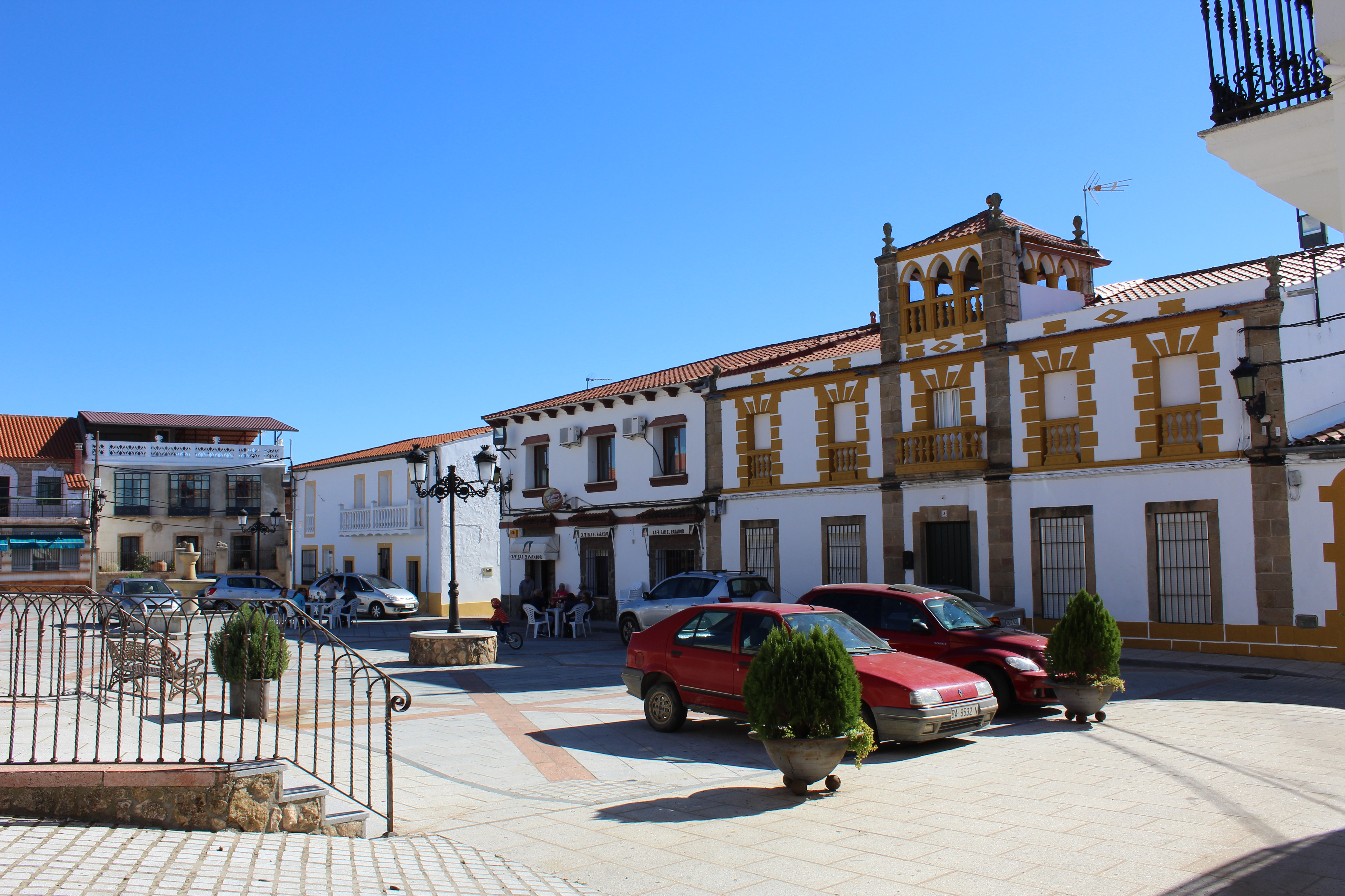 Ayuntamiento y plaza